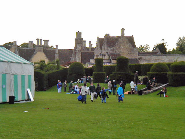 Hazelbury Manor